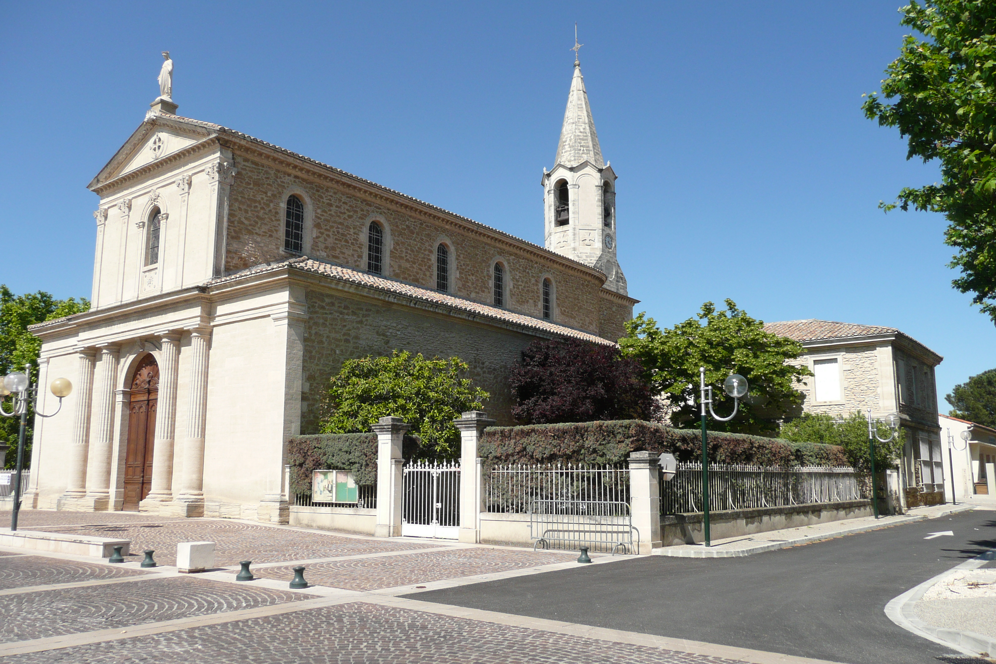 Eglise à Le Pontet (Vaucluse).